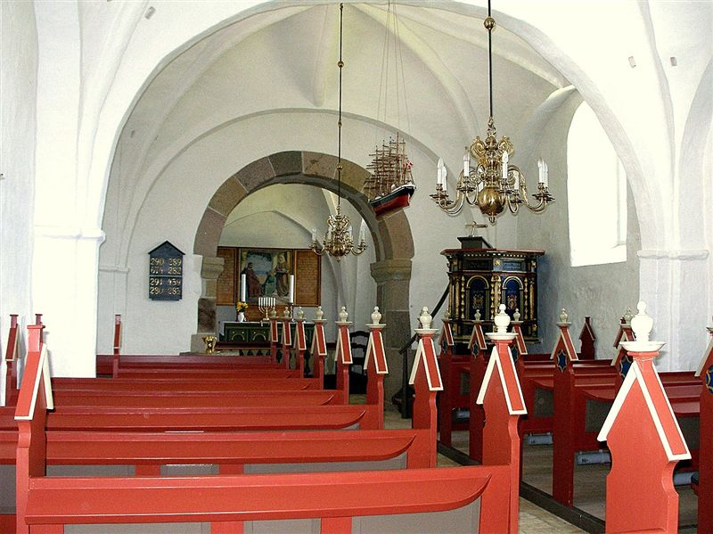 Fræer Kirke i Danmark. Skibet set mod øst